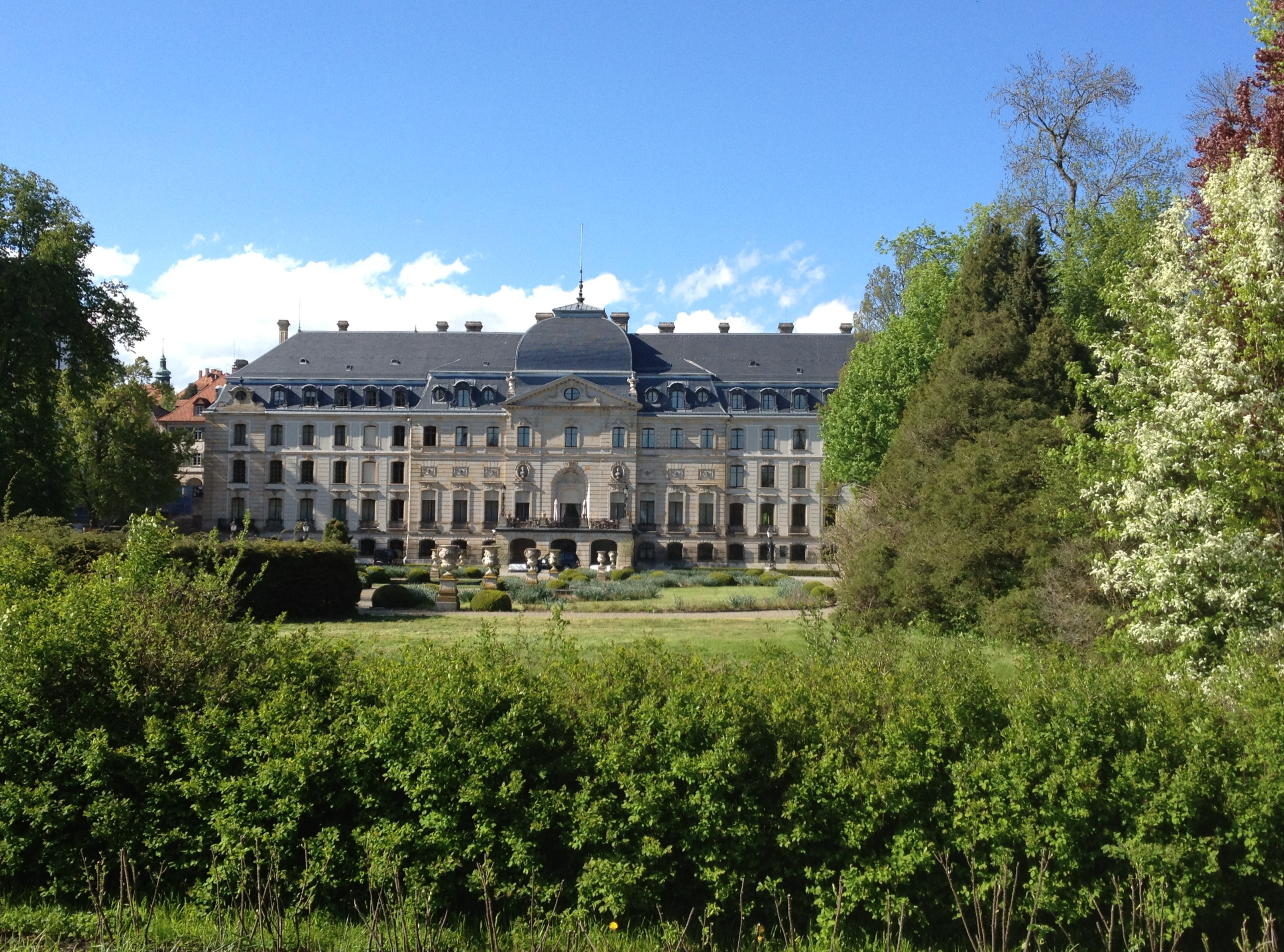 Fürstlich Fürstenbergisches Schloss Donaueschingen